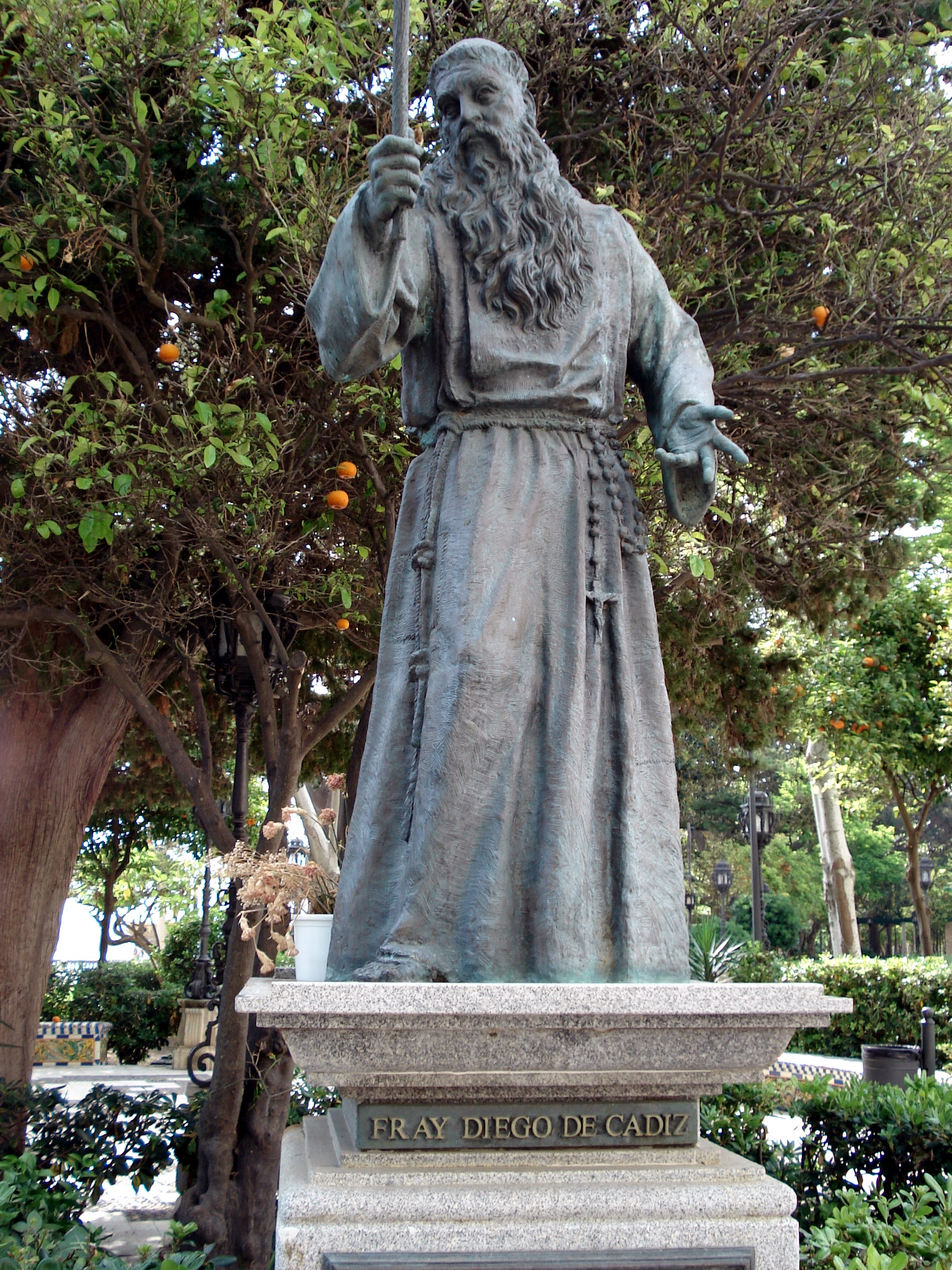 Monument to Fr. Diego José de Cádiz